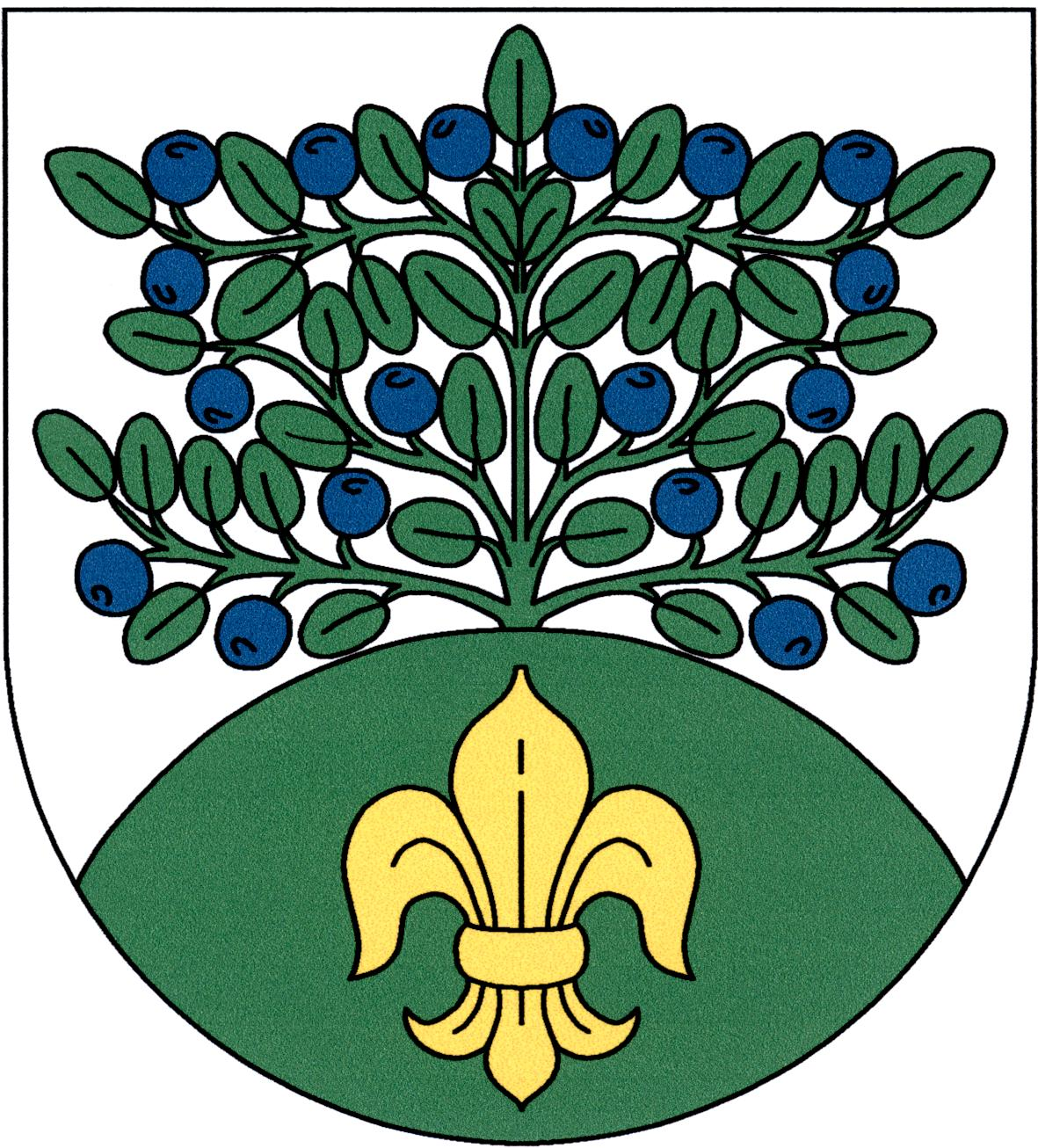 Znak obce Horka (okres Chrudim)